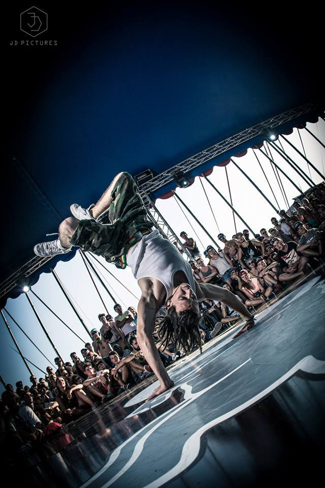 Bboy Domingo Judge showcase at Frauenfeld openair